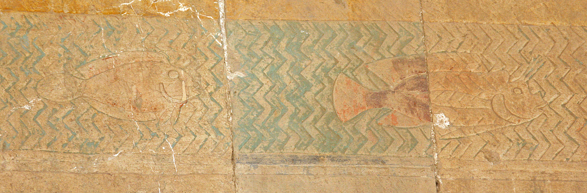 Zeichnung am Hatschepsut-Tempel in Deir-el-Bahri, Oberägypten. Punthalle, Motiv: Schiffe werden von Fischen umschwärmt, Detail der Fisch-Abbildung